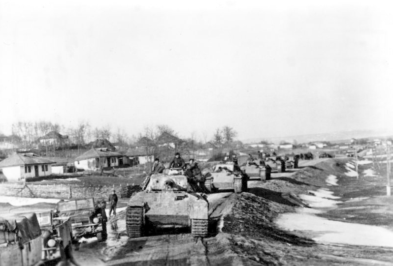 Rumänien, Kolonne von Panzer V (Panther) Scherl Bilderdienst Panzerregiment "Grossdeutschland" ein Angriff im Raum von Jassy Bei den harten Angriffs- und Abwehrkämpfen im Süden der Ostfront steht die Panzergrenadierdivision "Grossdeutschland" stehts im Brennpunkt der Schlacht. Unser Bild zeigt: Das Panzerregiment der Division, das sich in den letzten Tagen ganz besonders ausgezeichnet hatte, rollt zu einem Angriff im Raum von Jassy nach vorn. PK-Aufnahme Kriegsberichter van der Becke 4.5.44 [Herausgabedatum] 1641-44 [Rumänien, bei Iasi.- Kolonne von Panzer V "Panther" der Panzergrenadier-Division "Großdeutschland"]